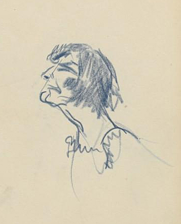 Edouard de Max : caricature